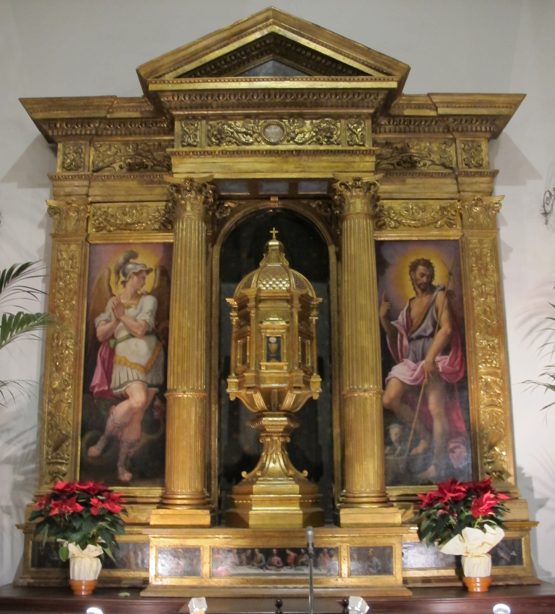 Ciborio di Girolamo Macchietti (1576)